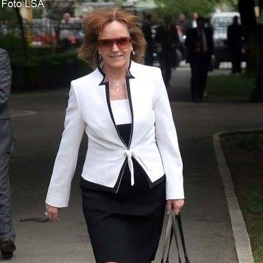 Lajla Pernaska, 2009